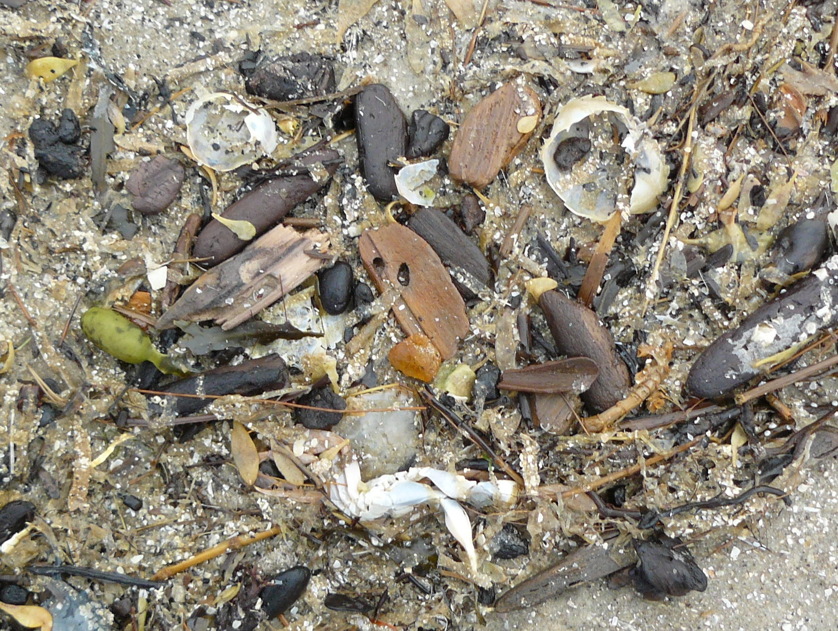 Sprockholz, Spülsaum auf der dänischen Nordseeinsel Fanö.